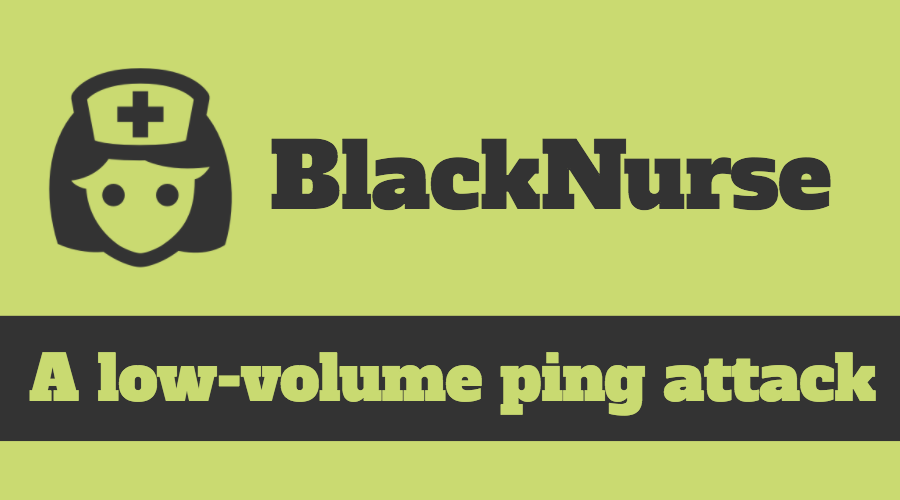 Монгол: Black Nurse